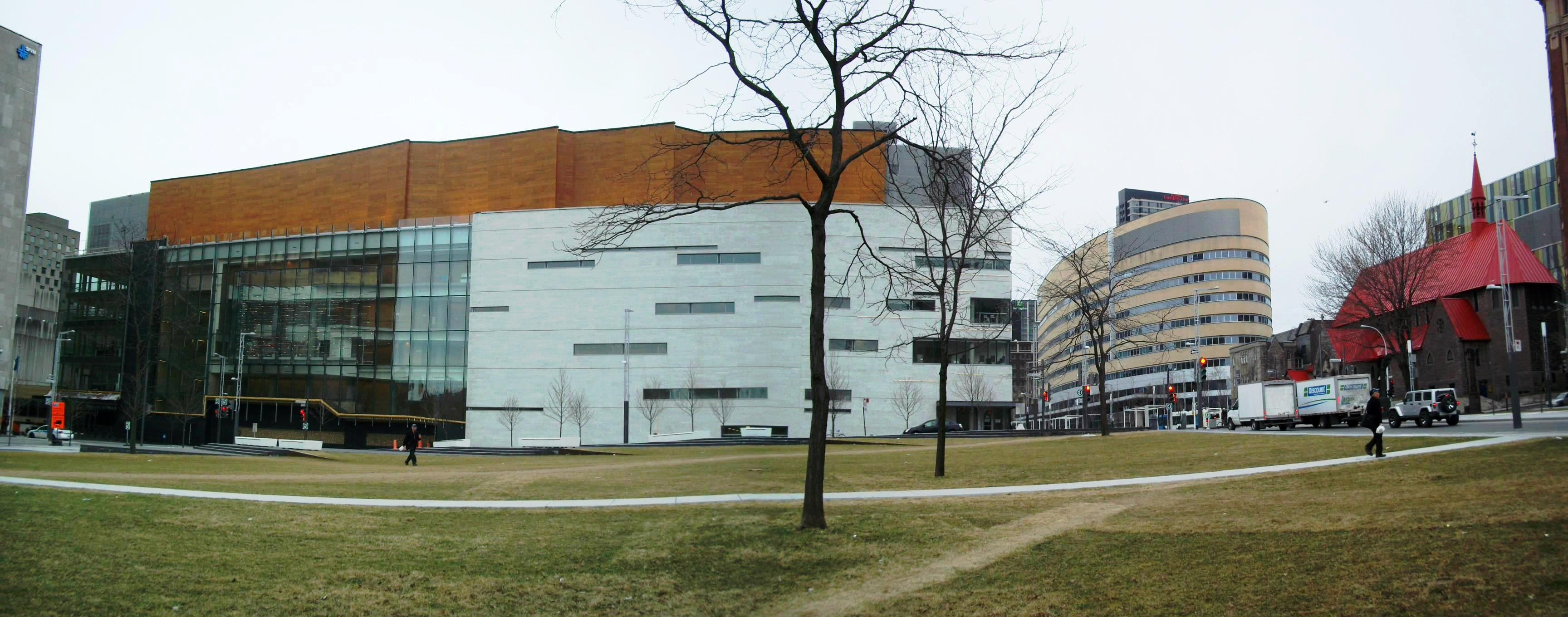 Maison symphonique de Montréal vue de l'Est